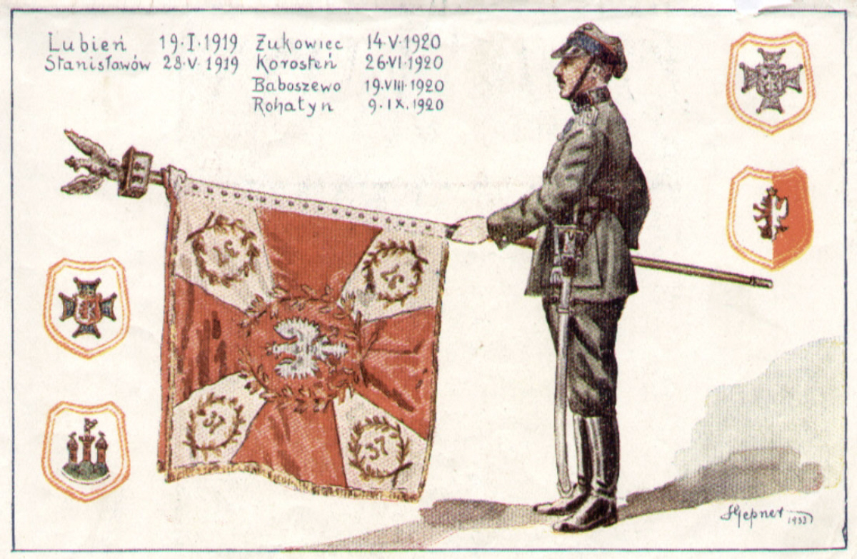 pl:37 Łęczycki Pułk Piechoty, soldier with banner